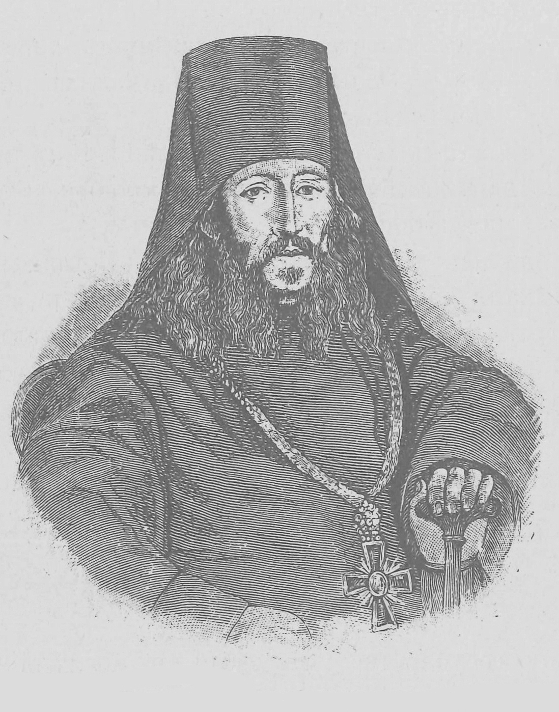 Архимандрит Мелхиседек (Значко-Яворский).